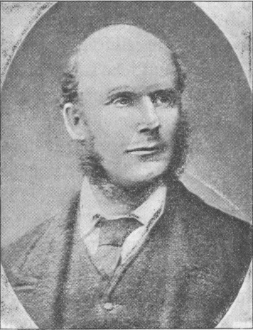 Granville Augustus William Waldegrave